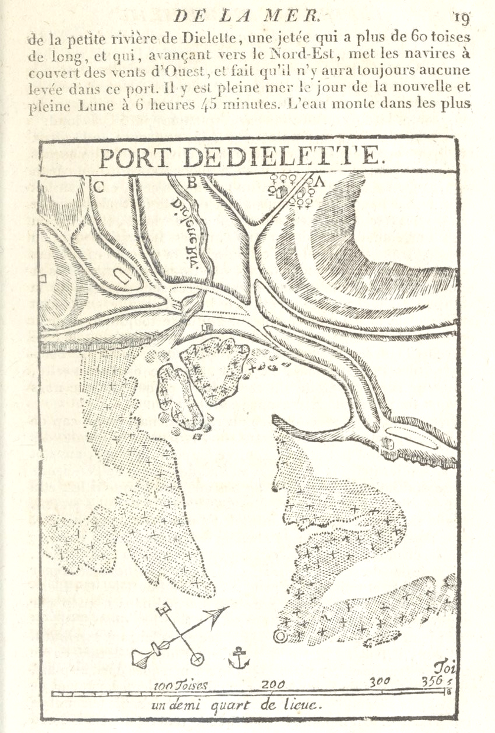 René Bougard, Le petit flambeau de la mer, 1817 : Port-Diélette.